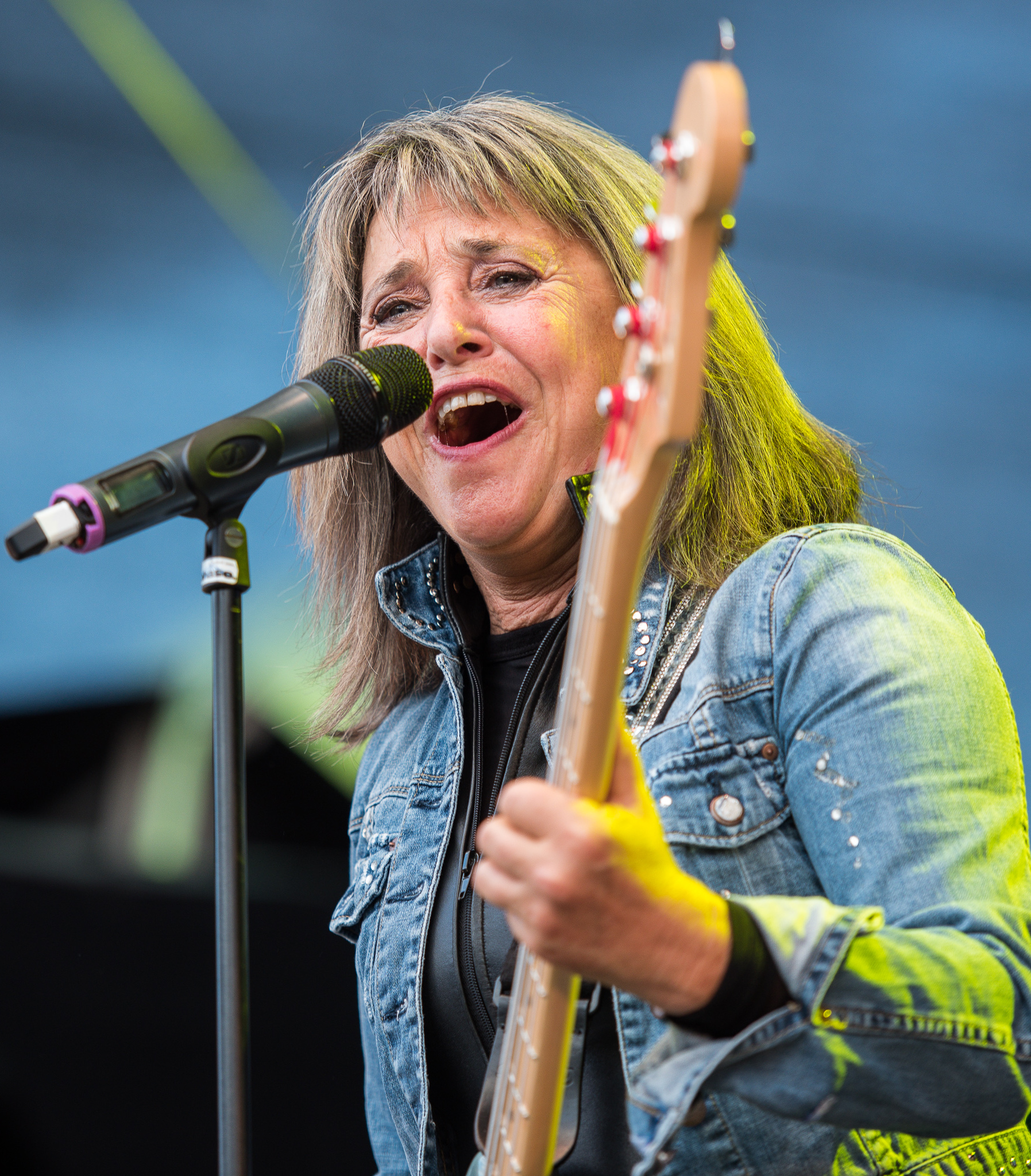 Brombachsee,Concertbüro Franken,Festival,Konzert,Lieder am See,Livekonzert,Livemusik,Musik,Susan Kay Quatro,Suzi Quatro